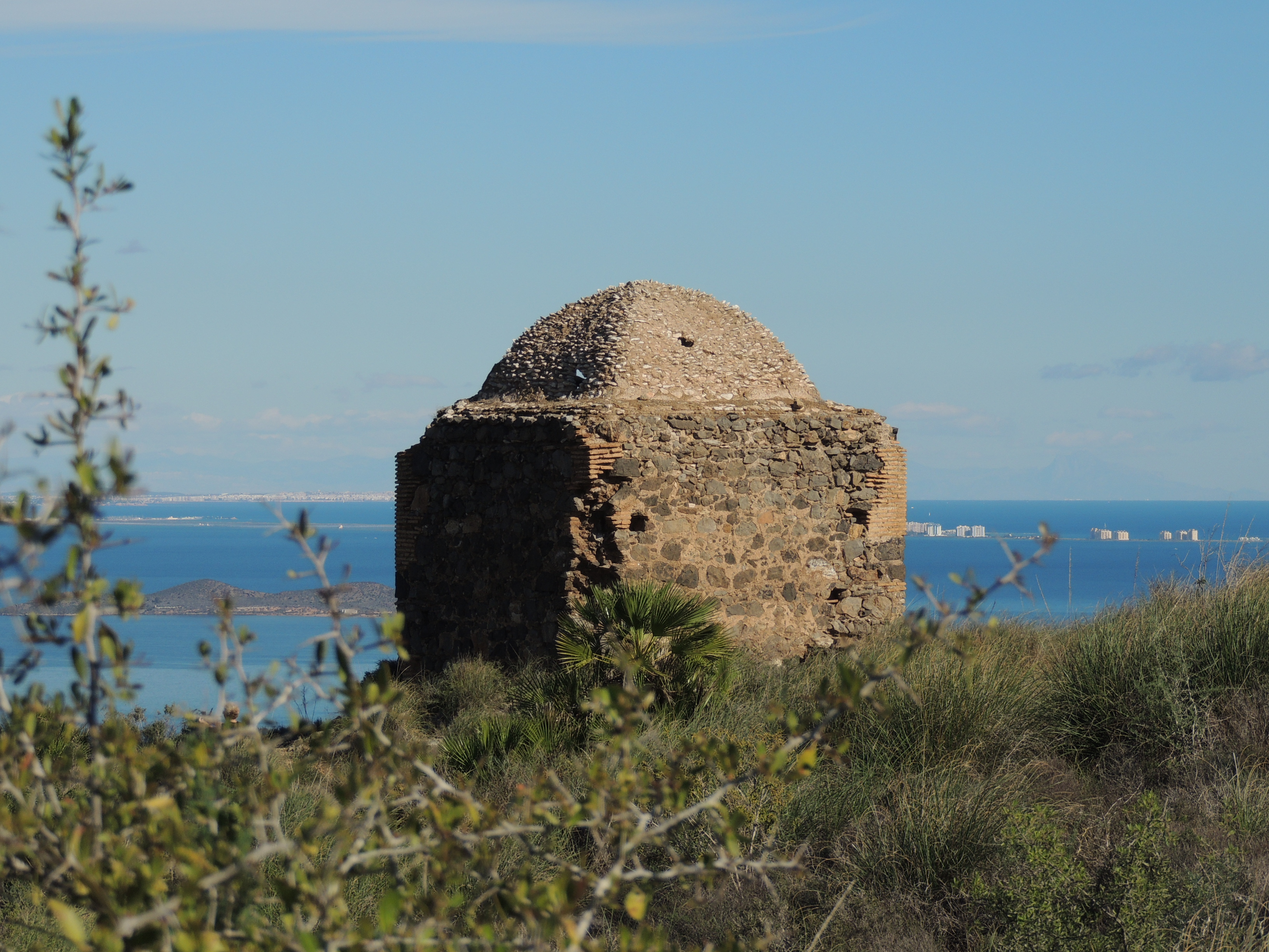 Ermita en la cima del Cabezo de San Ginés